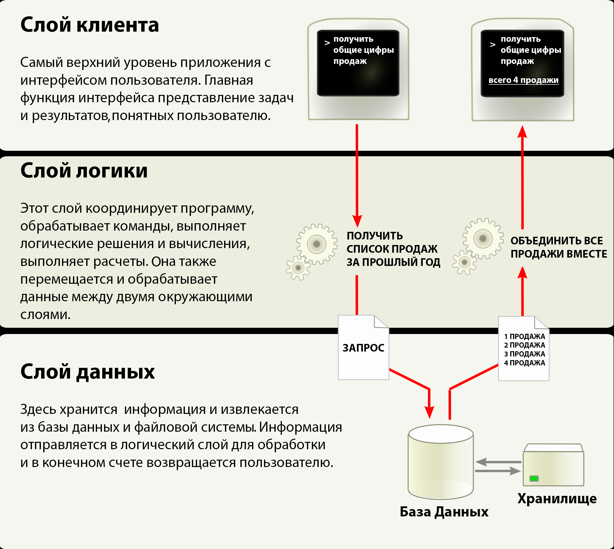 Трехархитектурная схема